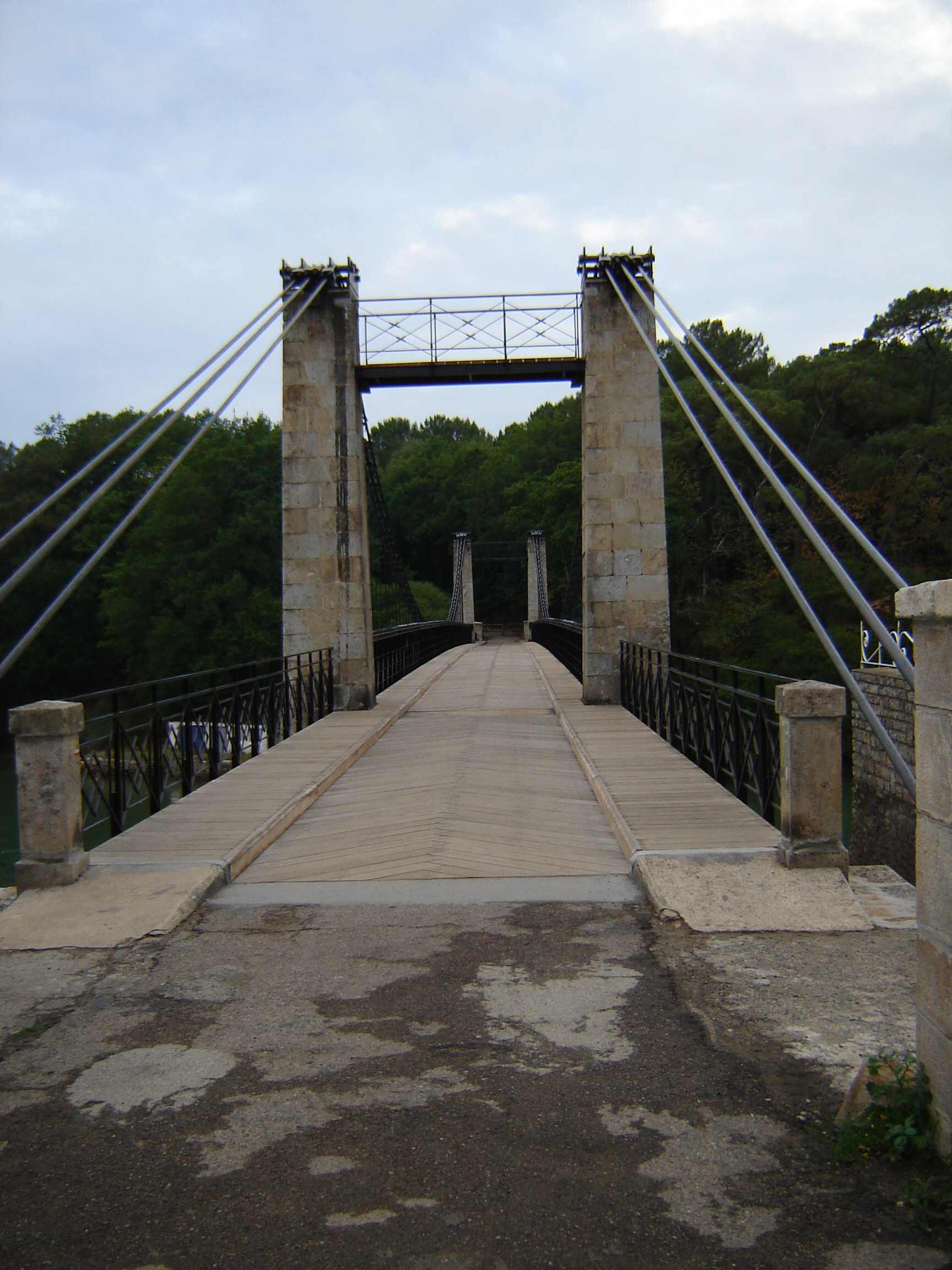 Vieux Pont, Le Bono, Morbihan, Bretagne, France. Old suspension bridge in Le Bono.